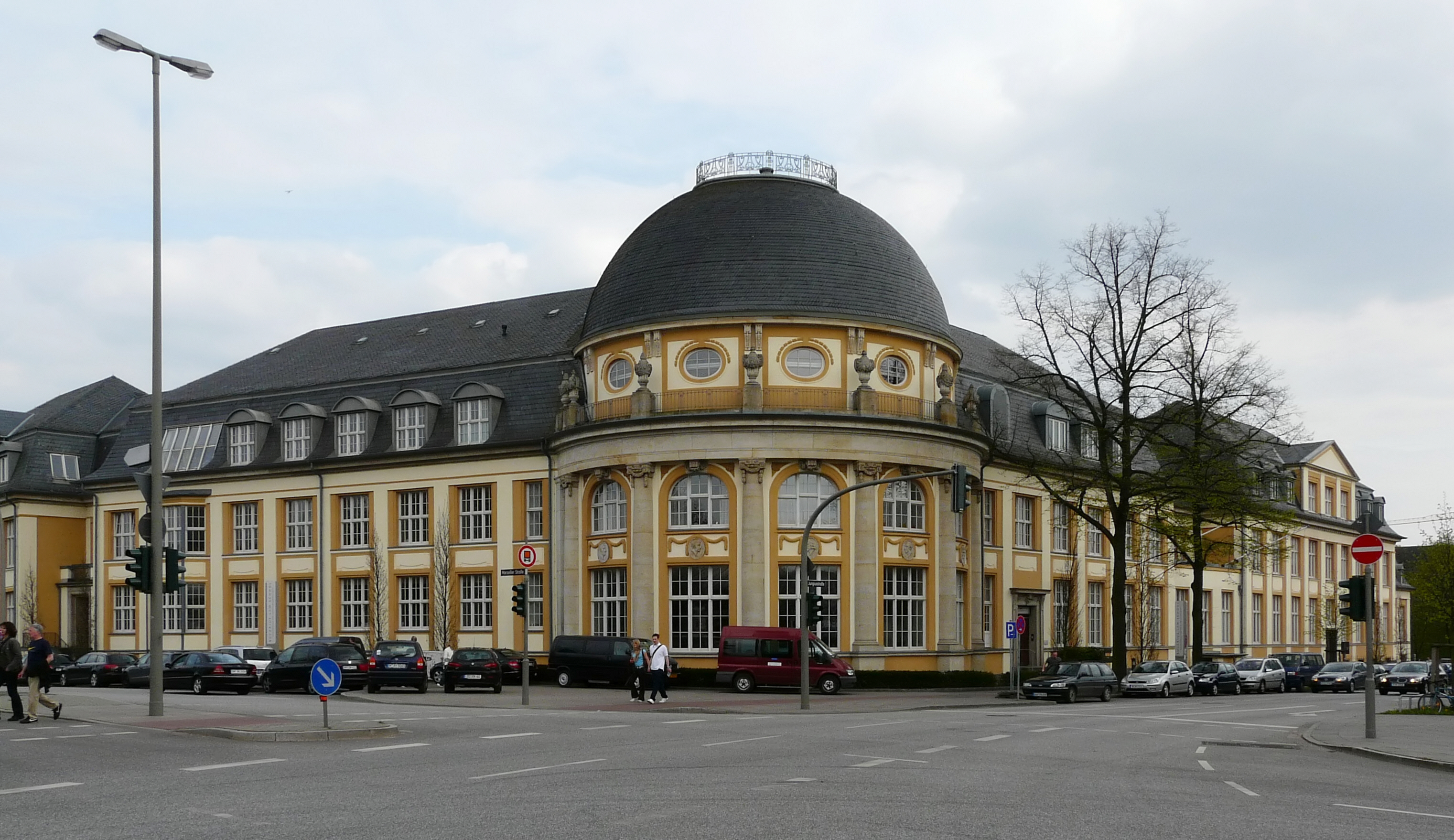 Außenansicht Bucerius Law School: Original Uploaded with Reworkhelper